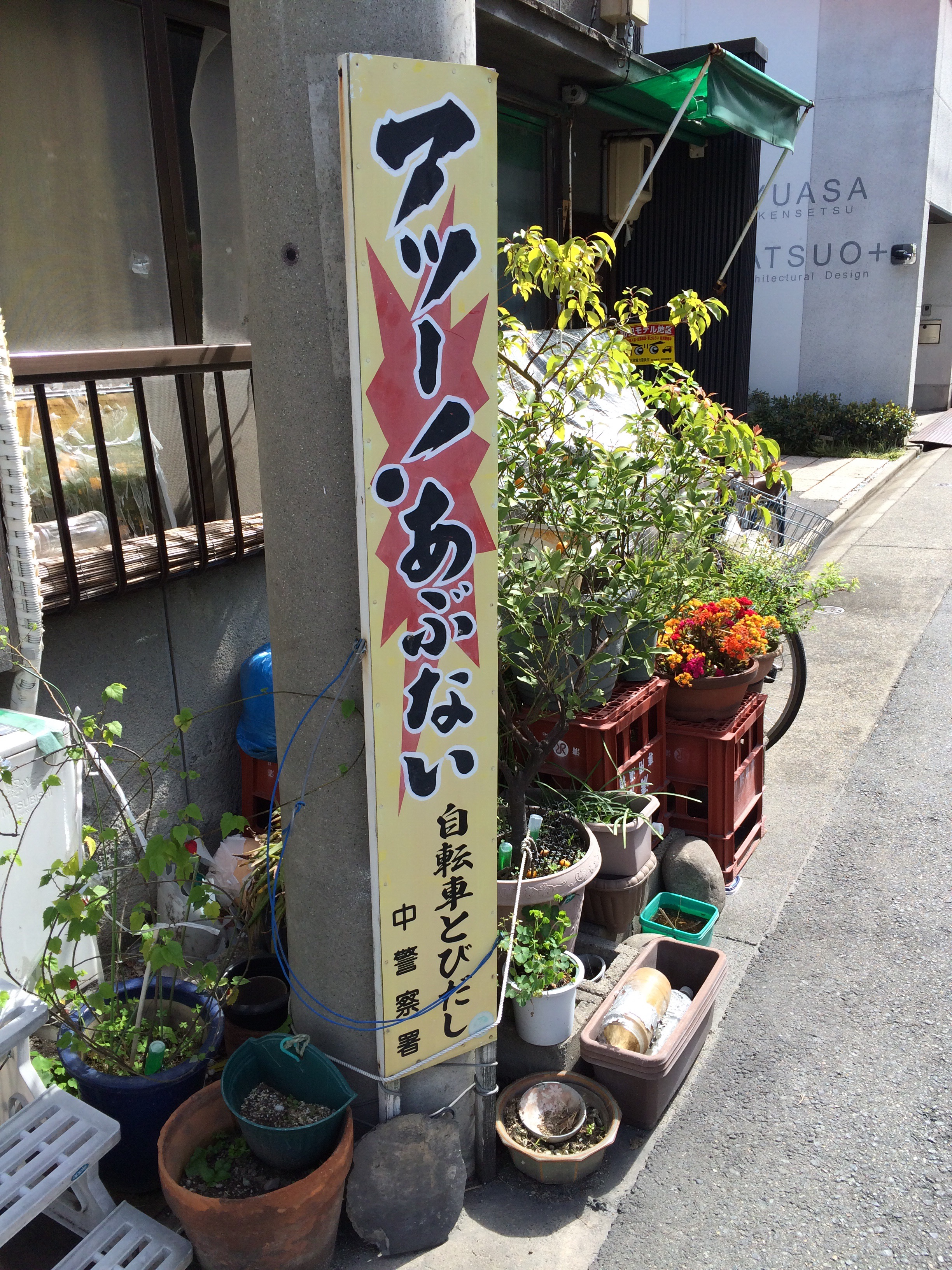 自転車とびだし 中警察署 アッー! / アーッ!